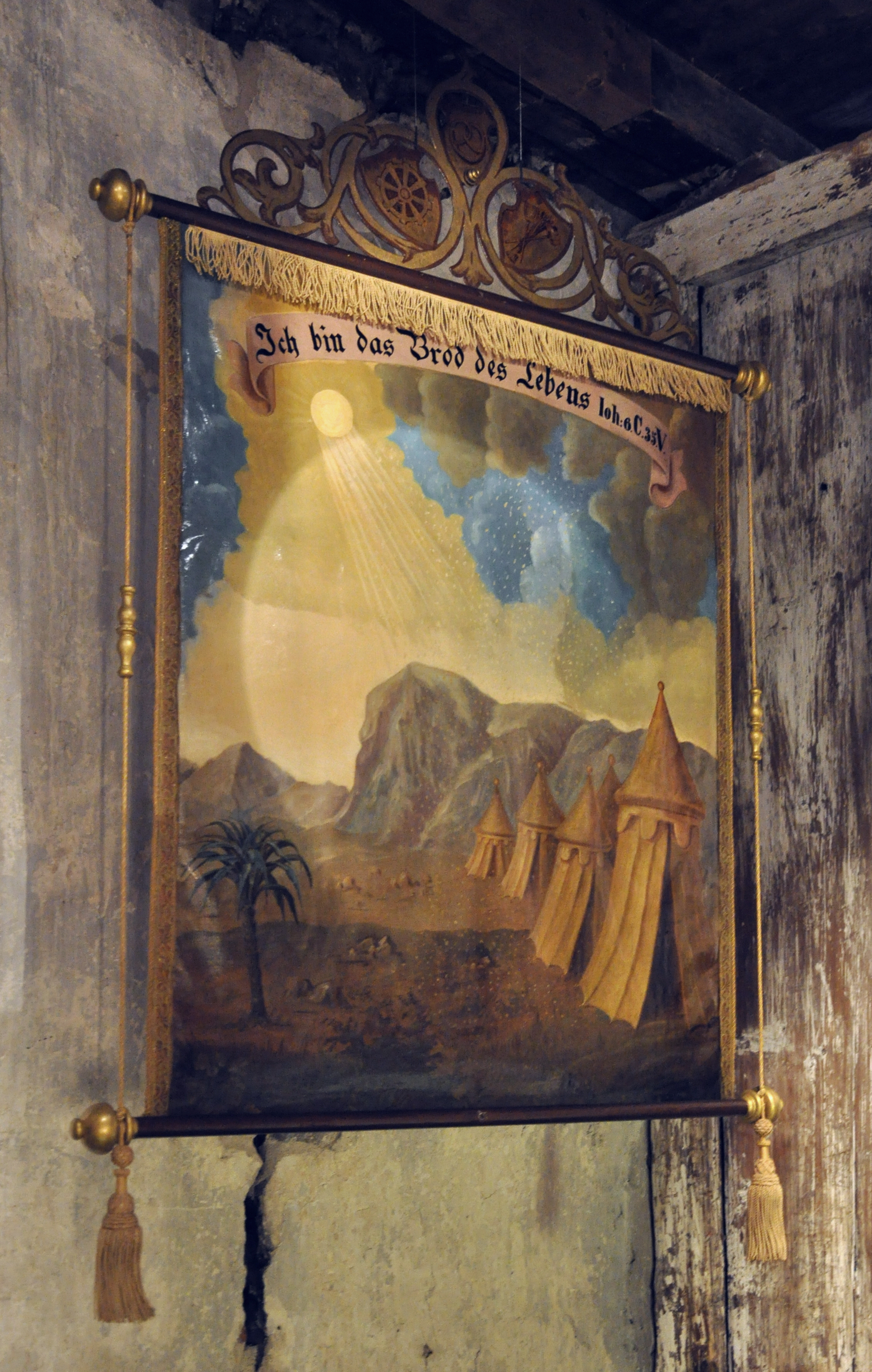 Zunftfahne der Bäckerzunft der Reichsstadt Ravensburg (?); Museum Humpis-Quartier, Ravensburg Humpis-Quartier Native nameMuseum Humpis-QuartierLocationRavensburg, GermanyCoordinates47° 46′ 49.8″ N, 9° 36′ 57.24″ E Established2009Web page control : Q1637298 VIAF: 128828875 LCCN: nb2007020847 GND: 4565586-8 WorldCat institution QS:P195,Q1637298